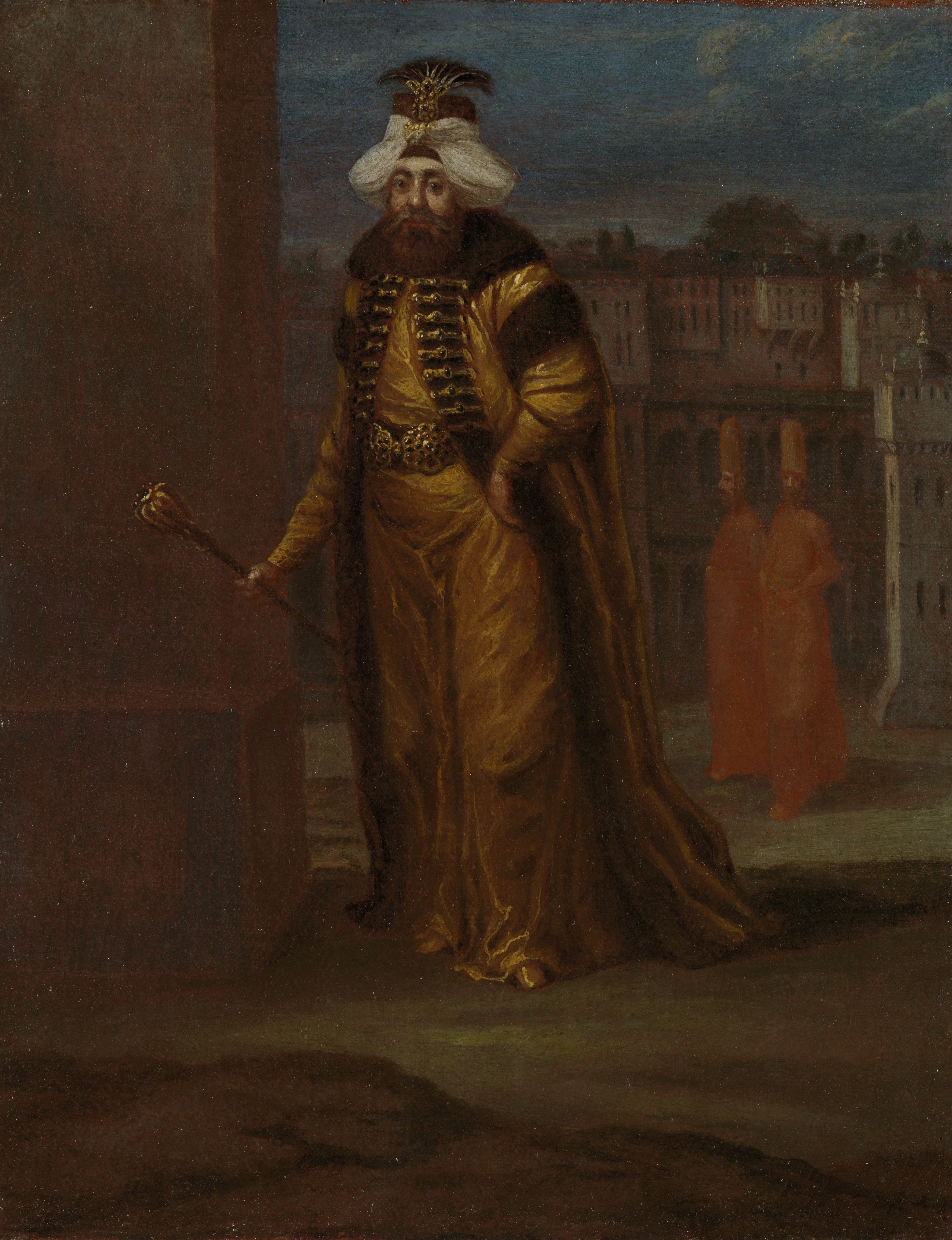 De sultan is geportretteerd in de open lucht vergezeld door twee dienaren. Op de achtergrond zien we enkele gebouwen. Mogelijk moet dit het haremgedeelte van het paleis van de sultan, het Topkapı Sarayı, voorstellen. Ahmed III draagt een met bont gevoerde kaftan en een tulband die kâtibî wordt genoemd. Dit type tulband was gedrapeerd rondom een plat hoofddeksel en versierd met een waaiervormig sieraad. Ook de ceintuur van de sultan is rijk bezet met juwelen, evenals de ceremoniële staf die hij in zijn rechterhand vasthoudt. Staande, ten voeten uit, scepter in de rechterhand. Op de achtergrond twee volgelingen voor het paleis.